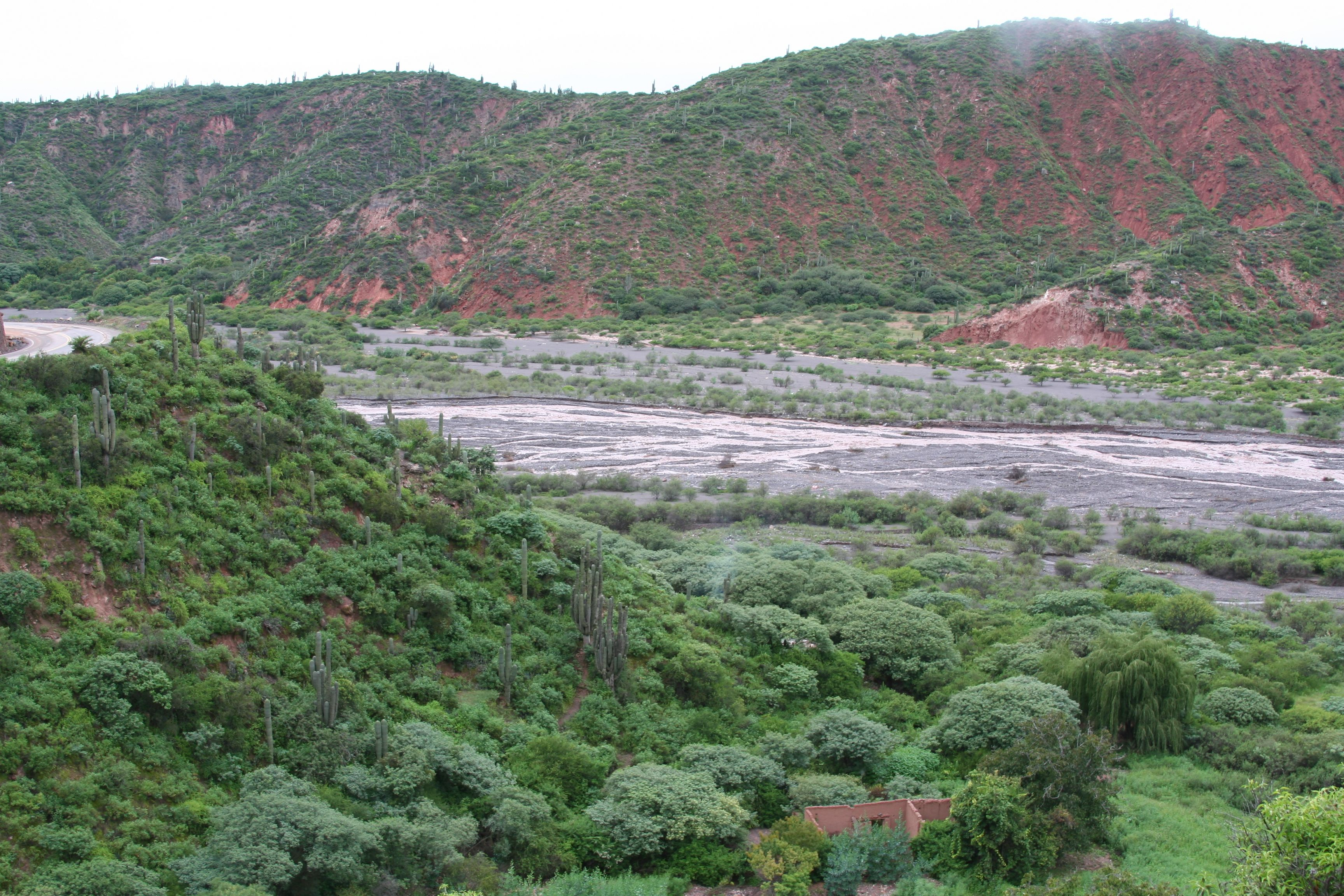 Quebrada del Obispo(Argentinien)